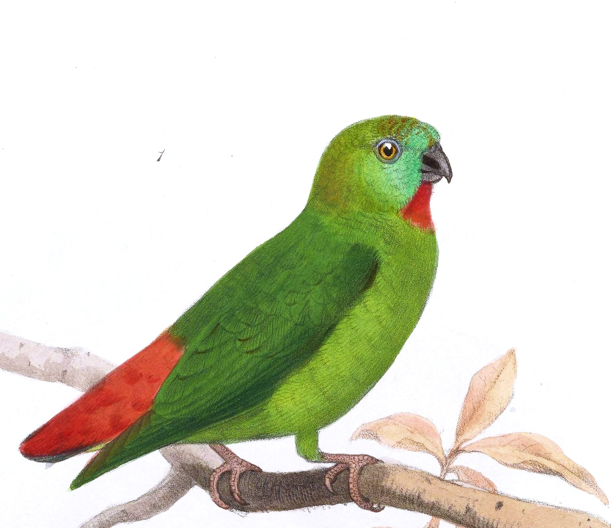 Loriculus aurantiifrons